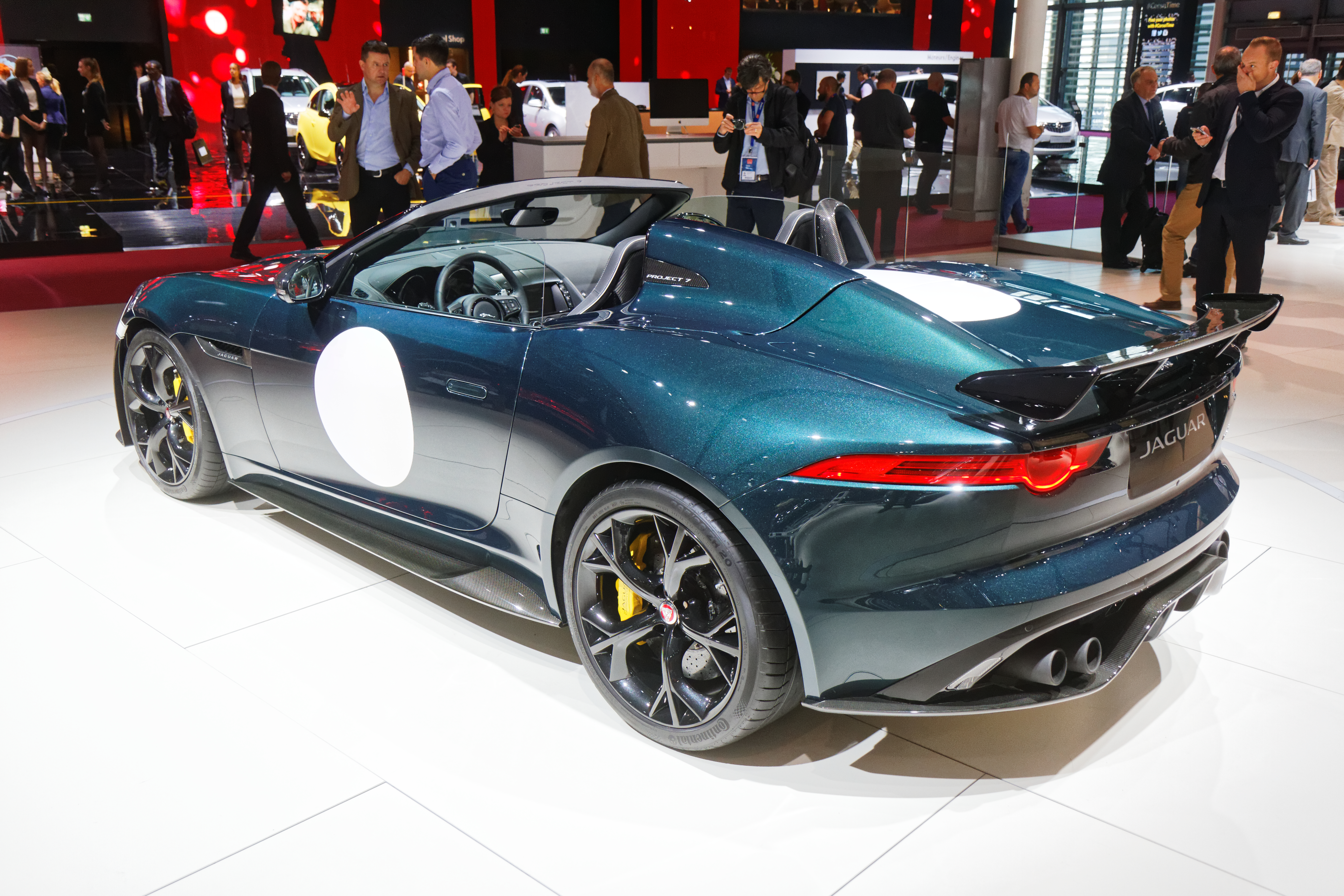 La Jaguar Project 7 présentée lors du mondial de l'automobile de Paris 2014.